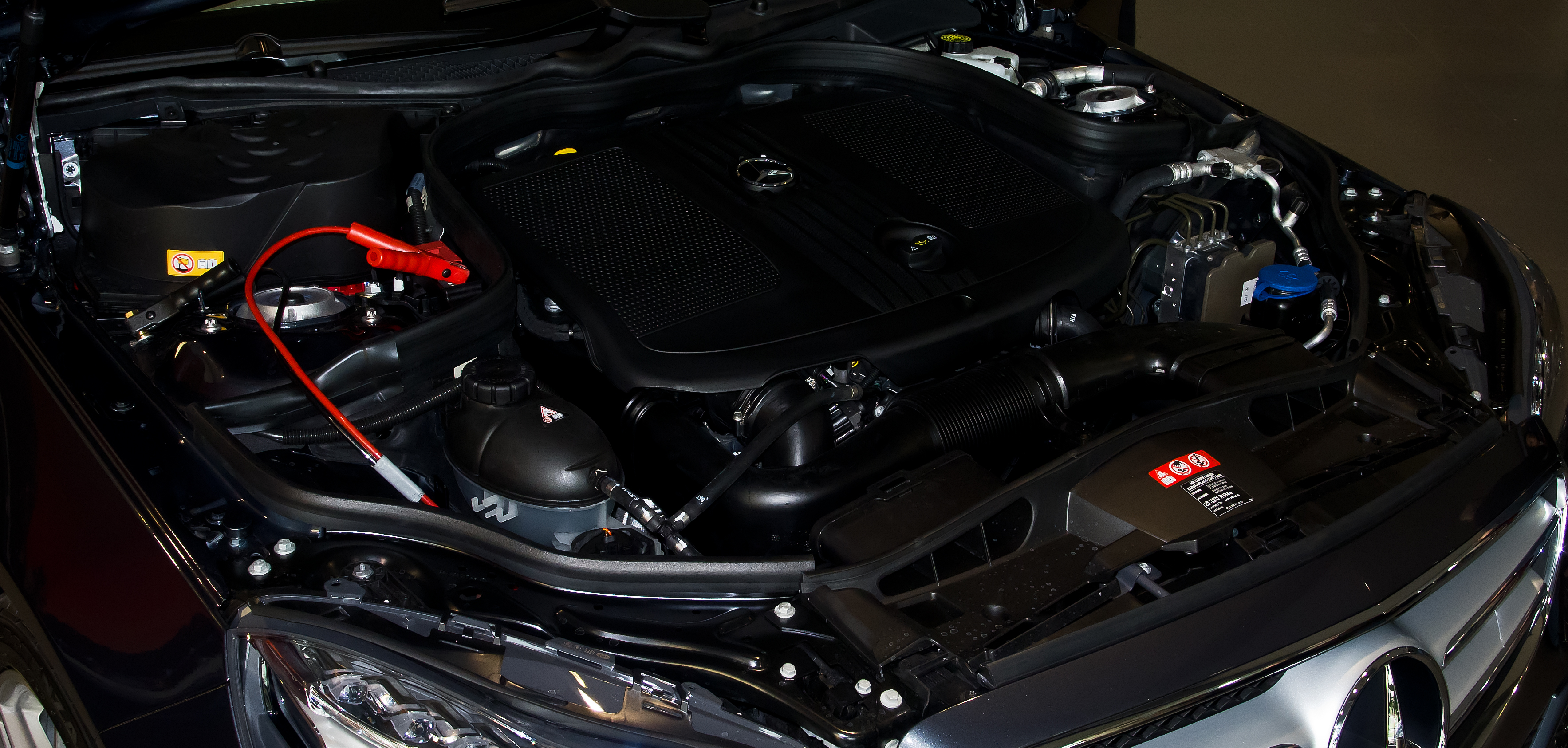 Mercedes-Benz E 250 CDI Avantgarde (W 212, Facelift)